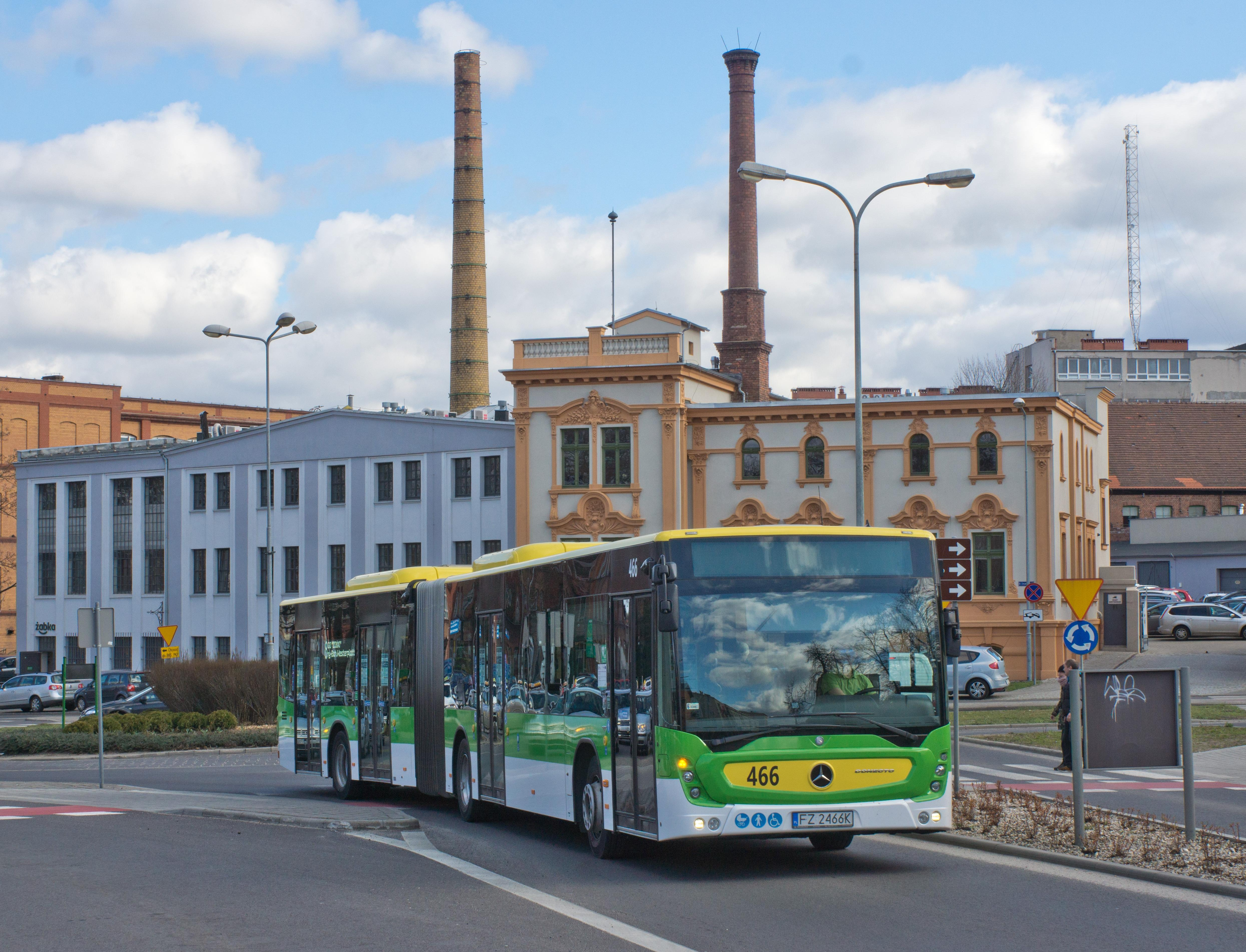 Zielona góra city bus